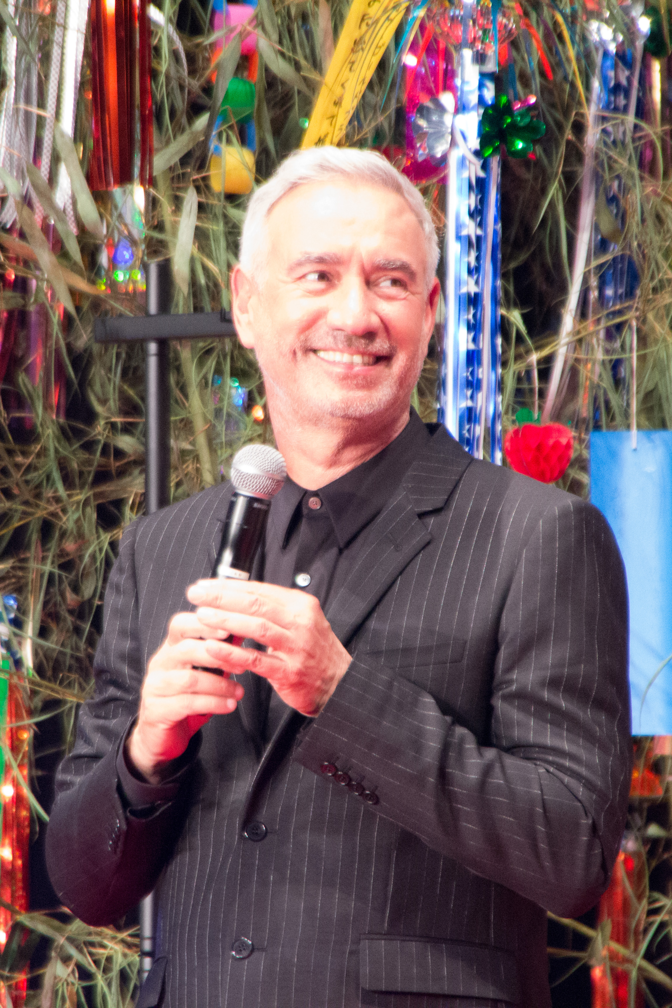 インデペンデンス・デイ: リサージェンス ジャパンプレミア ローランド・エメリッヒ